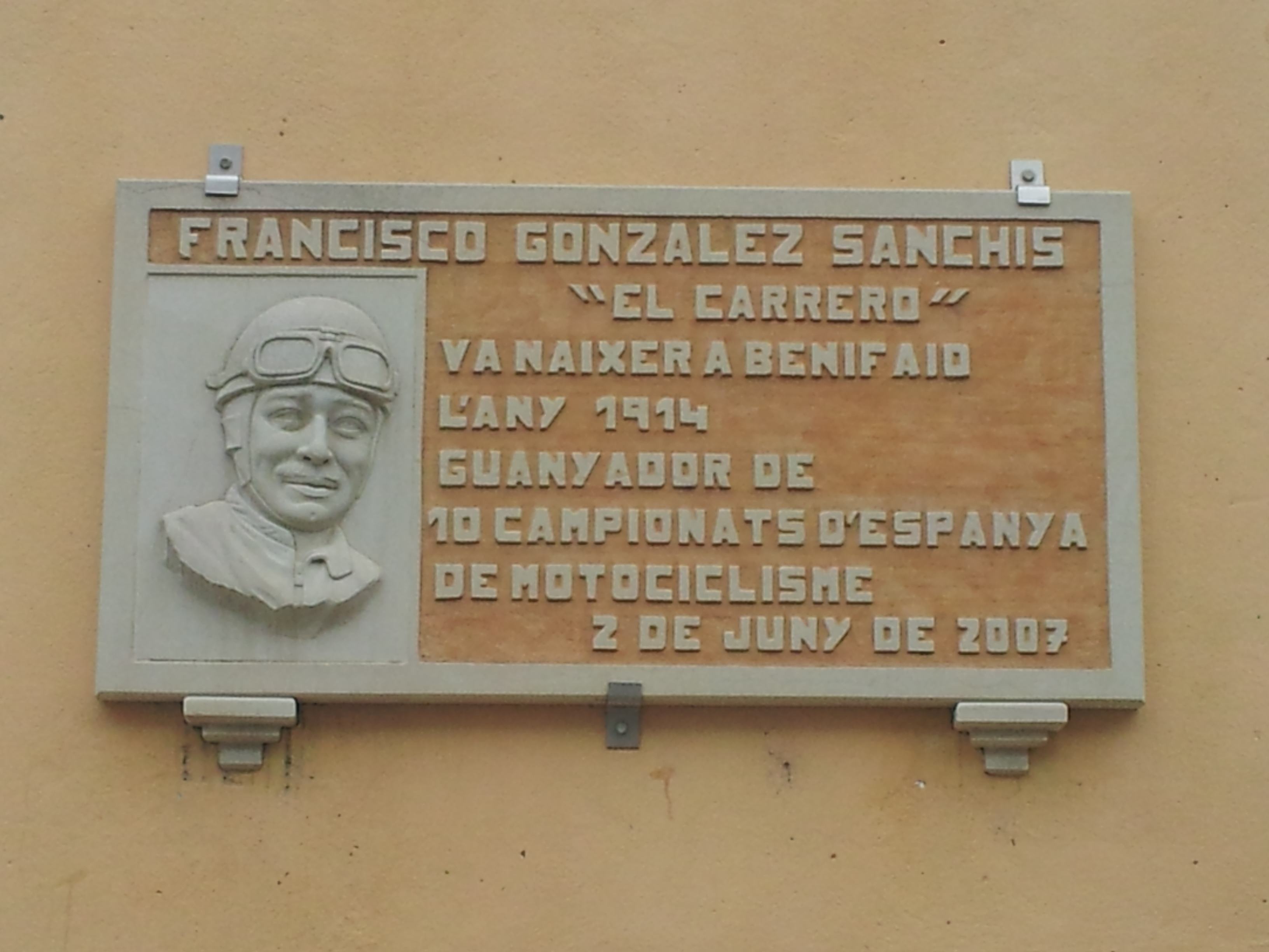 Placa en homenatge a Paco González Sanchis